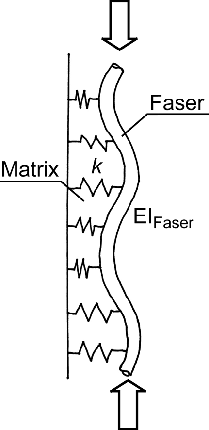 Veranschaulichung der Funktionsweise von druckbeanspruchten Fasern in einer Matrix. Version: 1